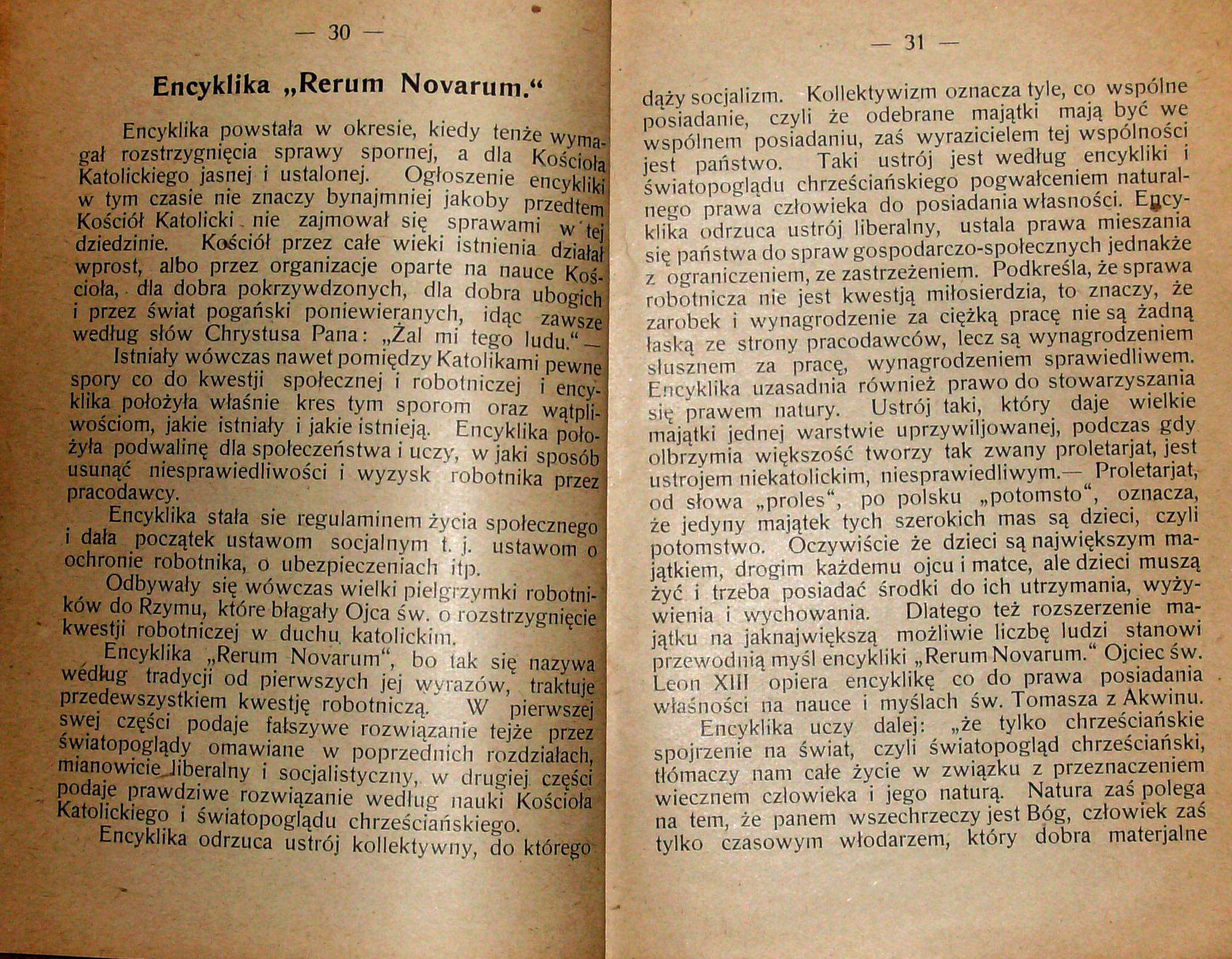 Stanisław Krzyżowski, Rozmyślania w czterdziestą rocznicę encykliki „Rerum novarum”, wydanej 15 maja 1891 r. przez papieża Leona XIII, Pszczyna 1931